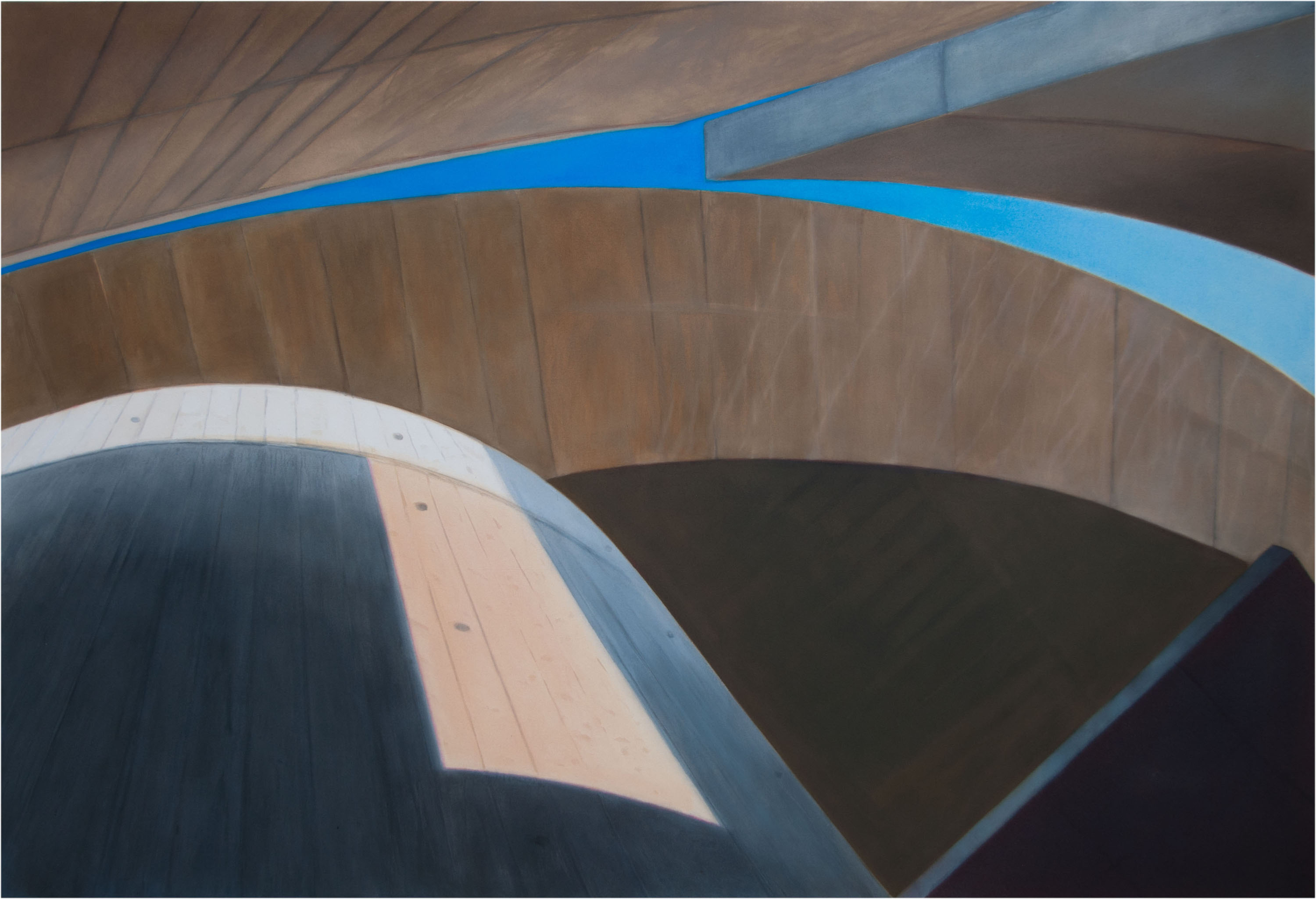 Fotografie eines Acrylgemäldes der deutschen Künstlerin Ute Langanky, entstanden 2017